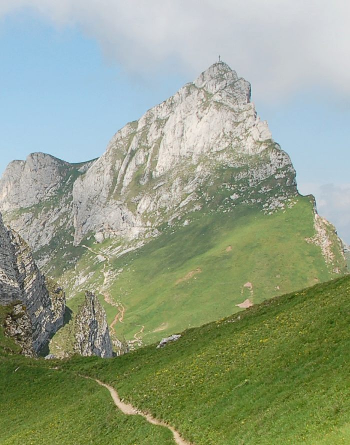 Hochiss, gesehen von einer Wiese zwischen Spieljoch und Seekarlspitze